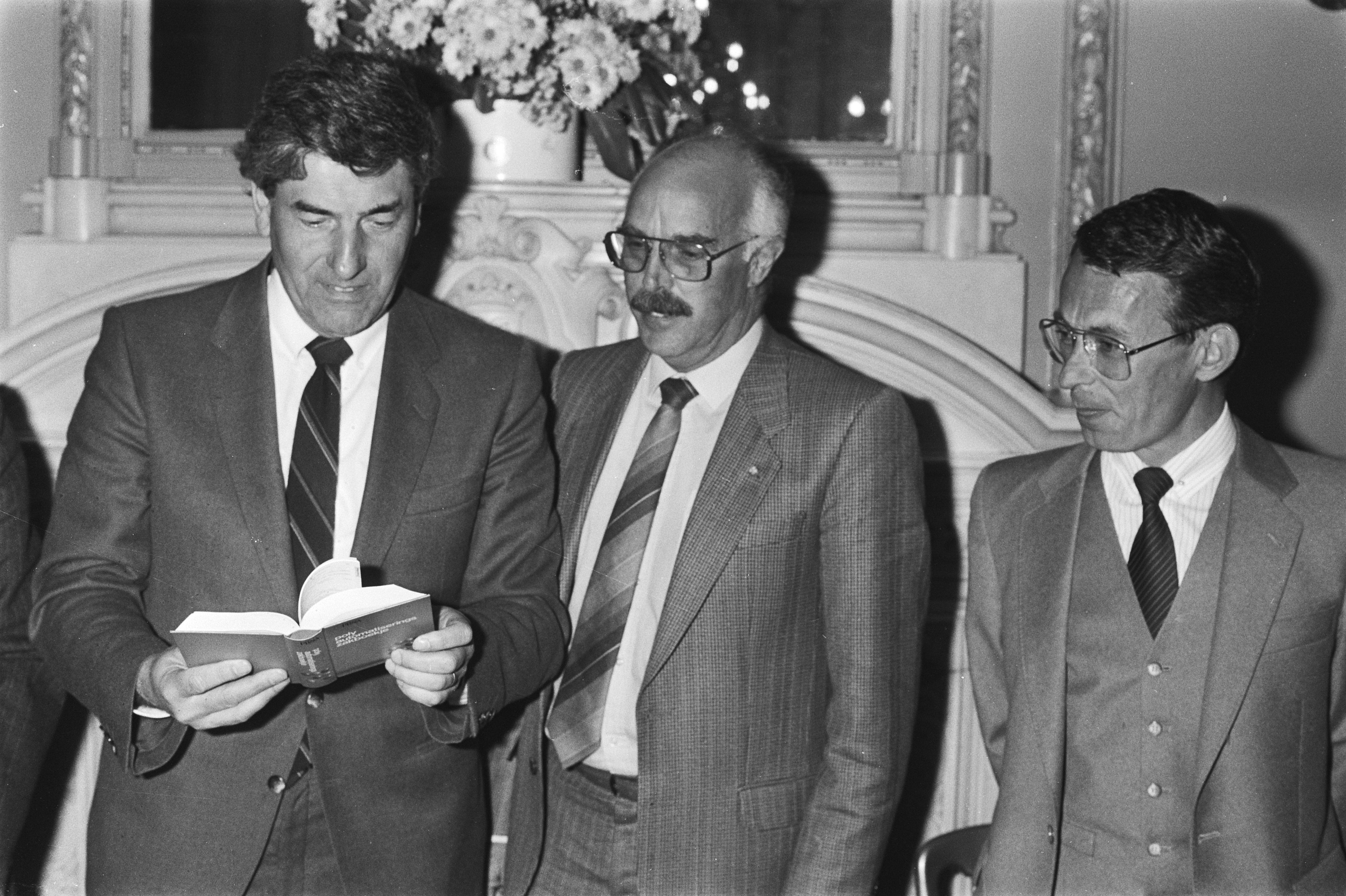 Collectie / Archief : Fotocollectie Anefo Reportage / Serie : [ onbekend ] Beschrijving : Premier Lubbers ontvangt "Poly-automatiserings-Zakboekje" van PBNA; vlnr Lubbers, OBNA-dir. Weusten en samensteller prof. Bemelmans Datum : 1 mei 1984 Locatie : Den Haag, Zuid-Holland Trefwoorden : ontvangsten, premiers Persoonsnaam : Bemelmans Fotograaf : Croes, Rob C. / Anefo Auteursrechthebbende : Nationaal Archief Materiaalsoort : Negatief (zwart/wit) Nummer archiefinventaris : bekijk toegang 2.24.01.05 Bestanddeelnummer : 932-9533